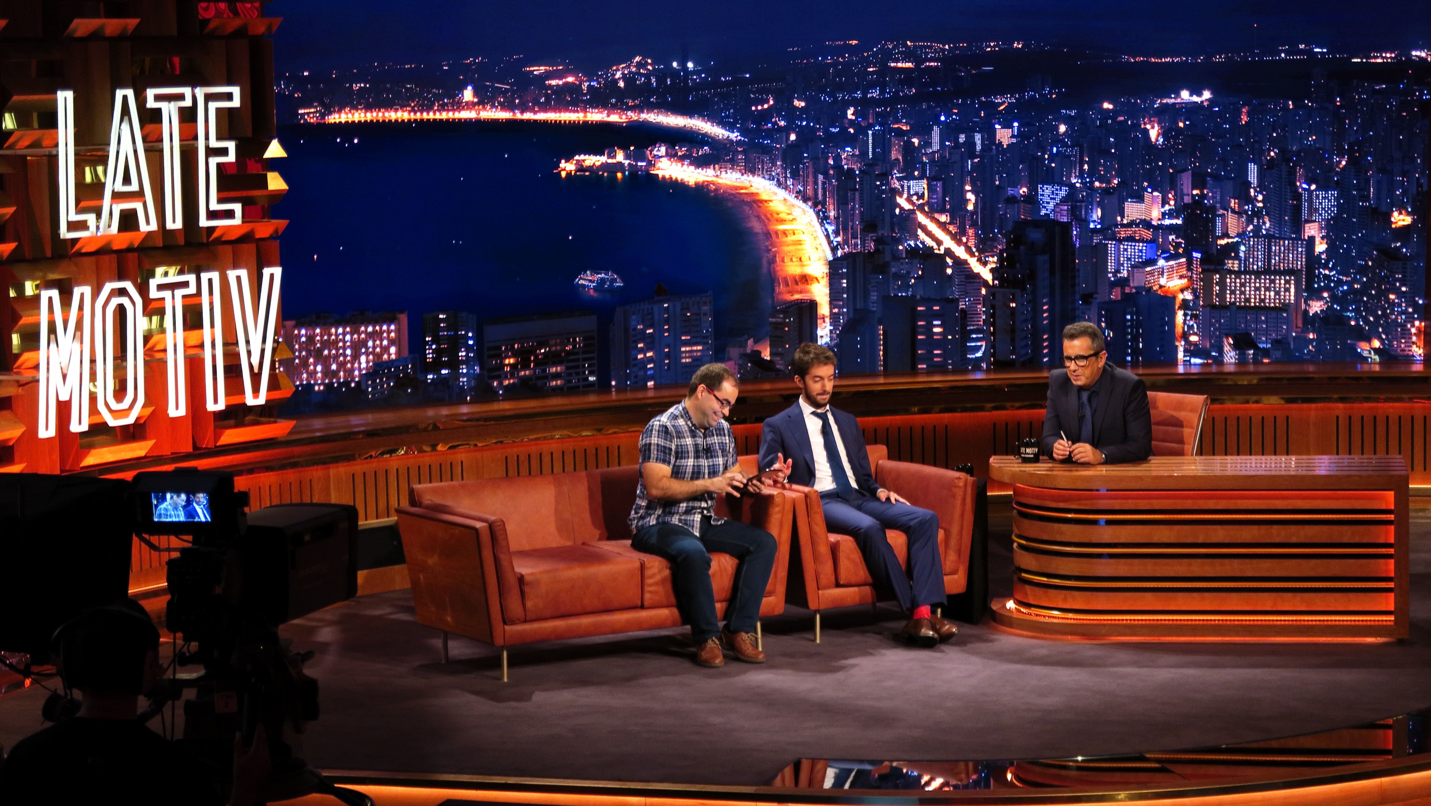 Late Motive, programa 131, Buenafuente, David Broncano, y Rubén Ojeda de Wikimedia España.